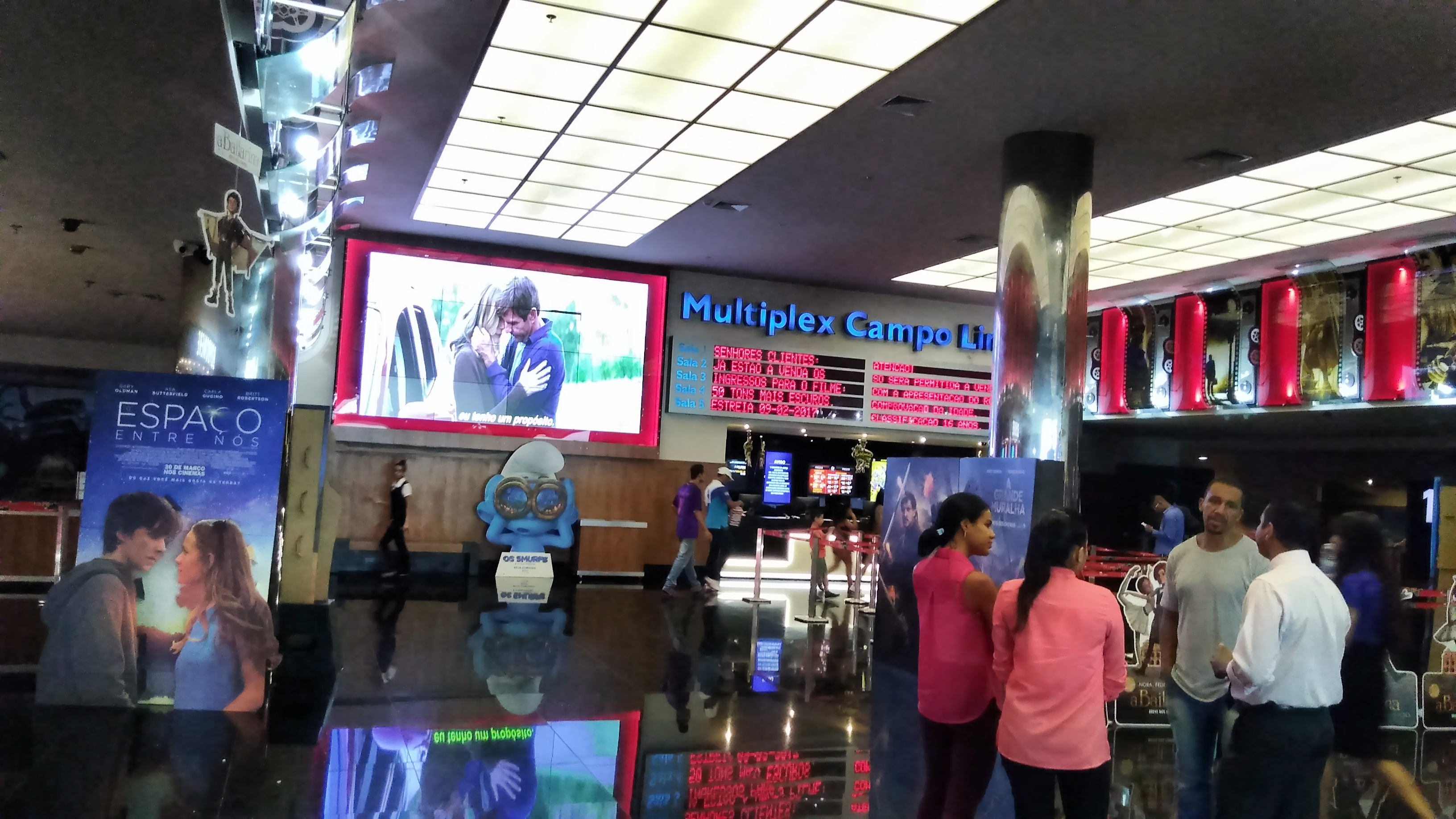 Detalhe do foyer do Multiplex Campo Limpo de São Paulo, SP